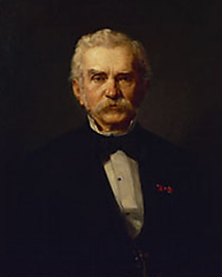 Dr. Moriz von Kaiserfeld ist stehend in Dreiviertelansicht wiedergegeben. Er stützt die Rechte in die Seite und blickt den Betrachter entschlossen an. In der Abfolge der Präsidenten ist von Kaiserfeld der Vorgänger von Ritter von Hopfen. Der dunkle, unbestimmte Hintergrund lenkt die Aufmerksamkeit des Betrachters ganz auf den Gesichtsausdruck des Dargestellten. Dieser vermittelt Ernsthaftigkeit und Entschlossenheit.